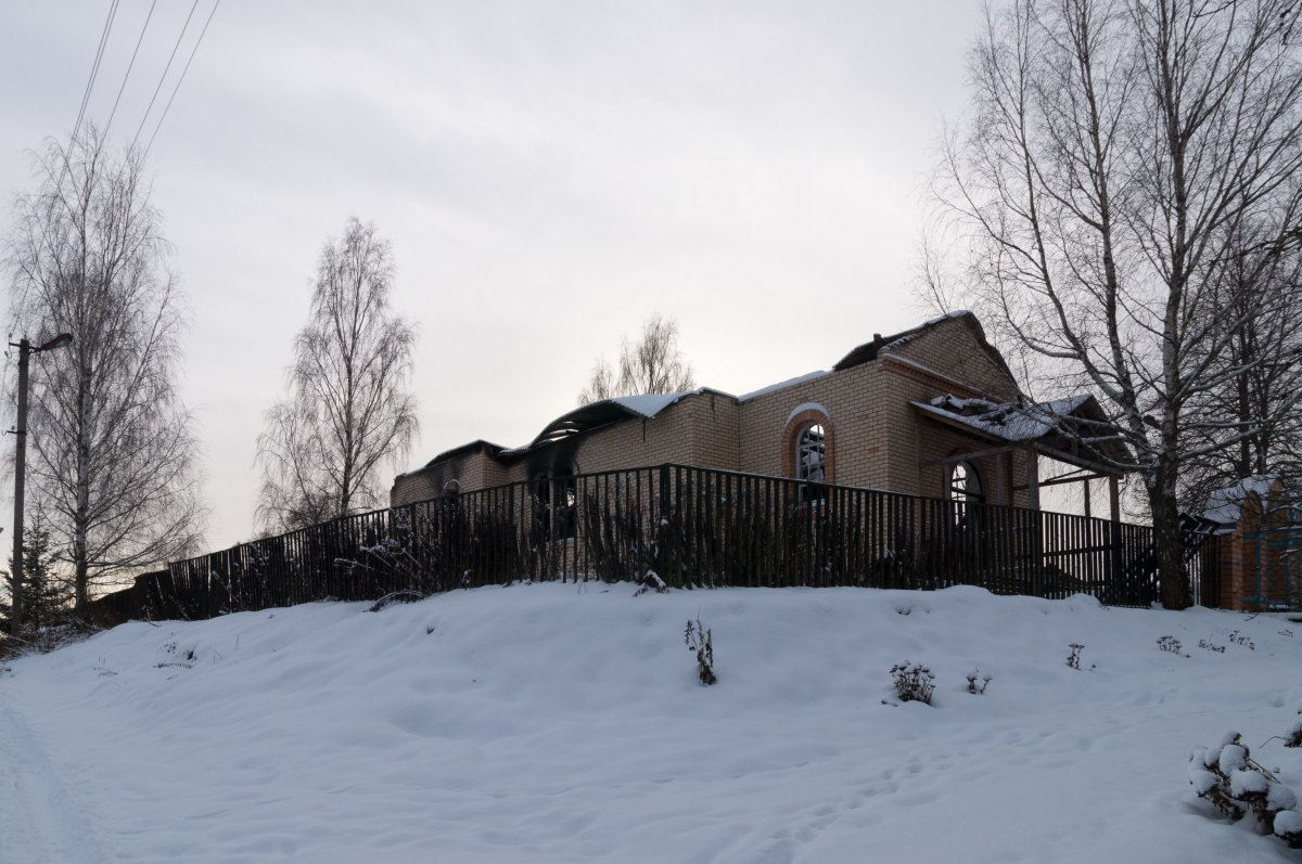 Рэчкі. Свята-Духаўская царква пасля пажару